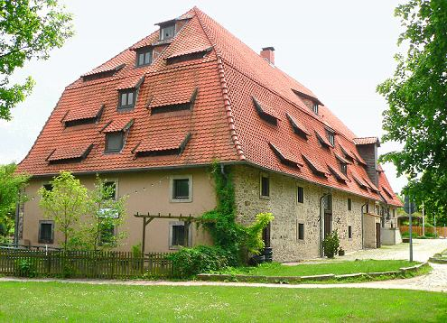 Altes Brauhaus Wolfsburg-Fallersleben